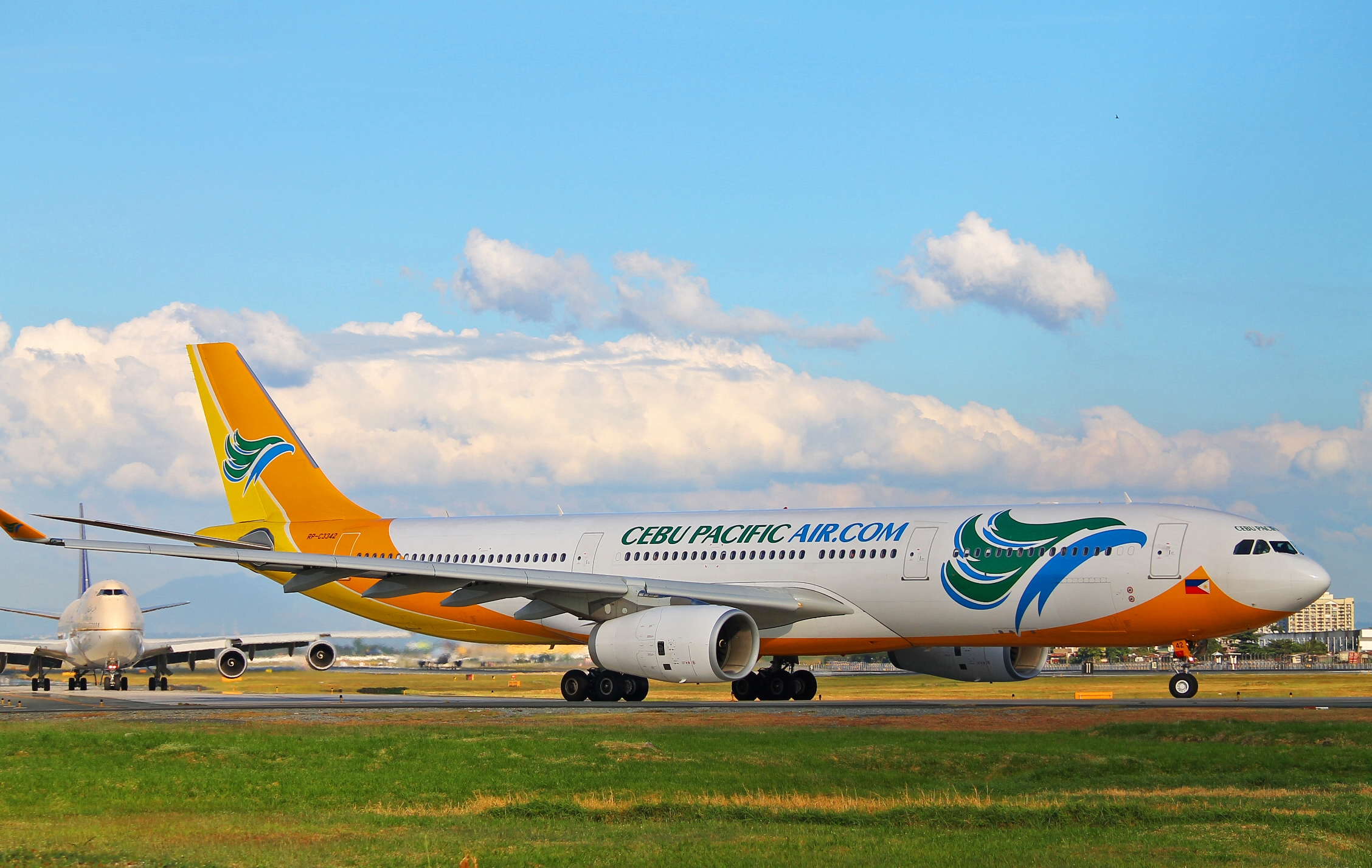 Cebu Pacific Air A330-300